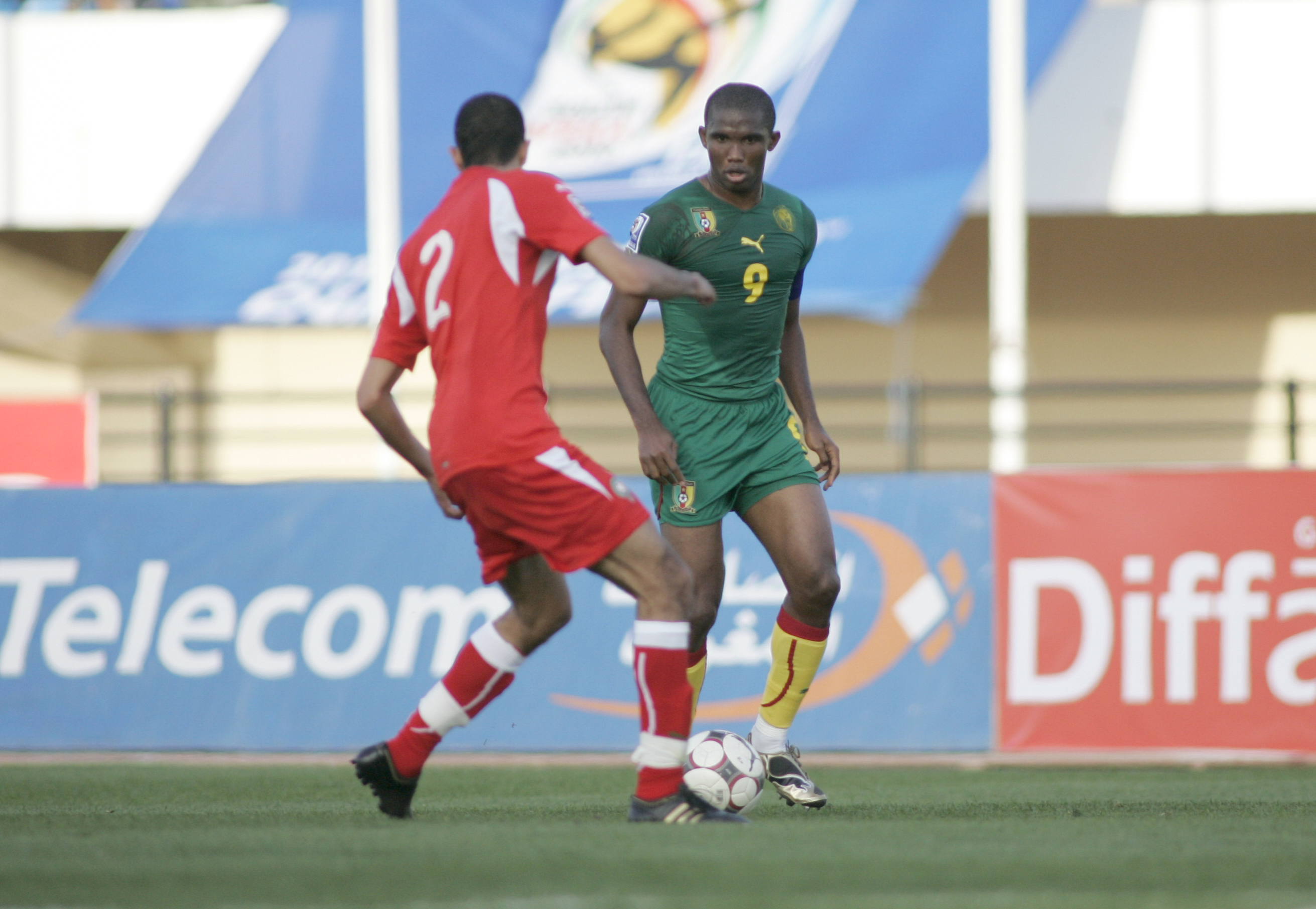 Aissam el aouda eto'o